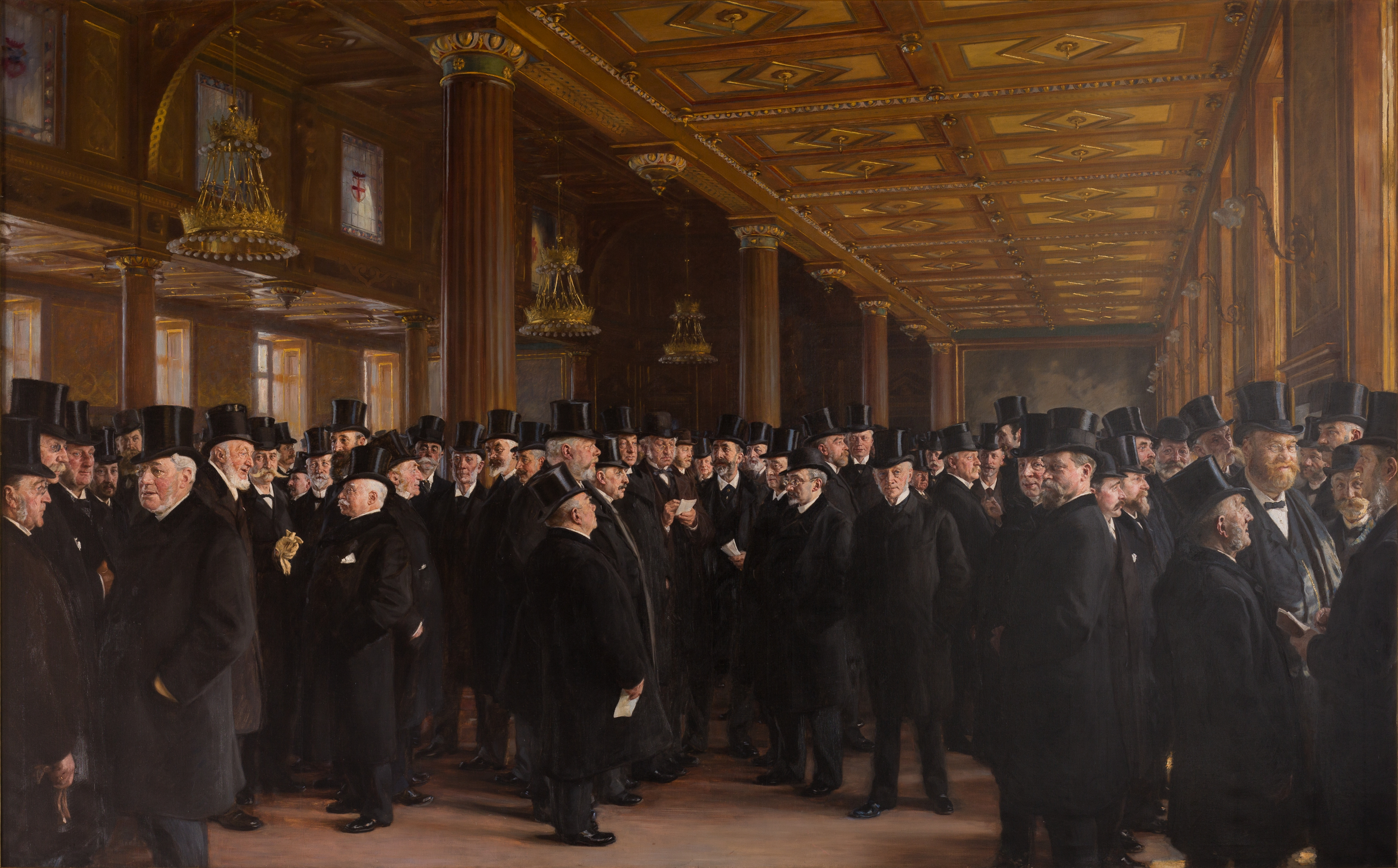 "Fra Københavns Børs" maleri af P.S. Krøyer fra 1895